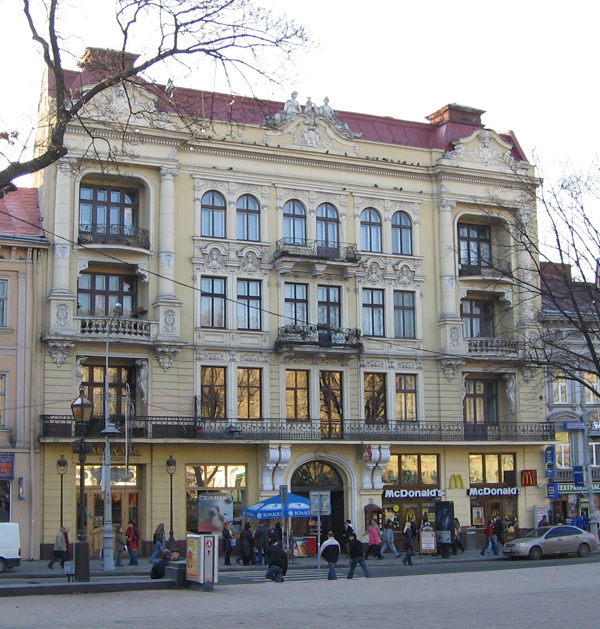 Пассаж Фуллера во Львове